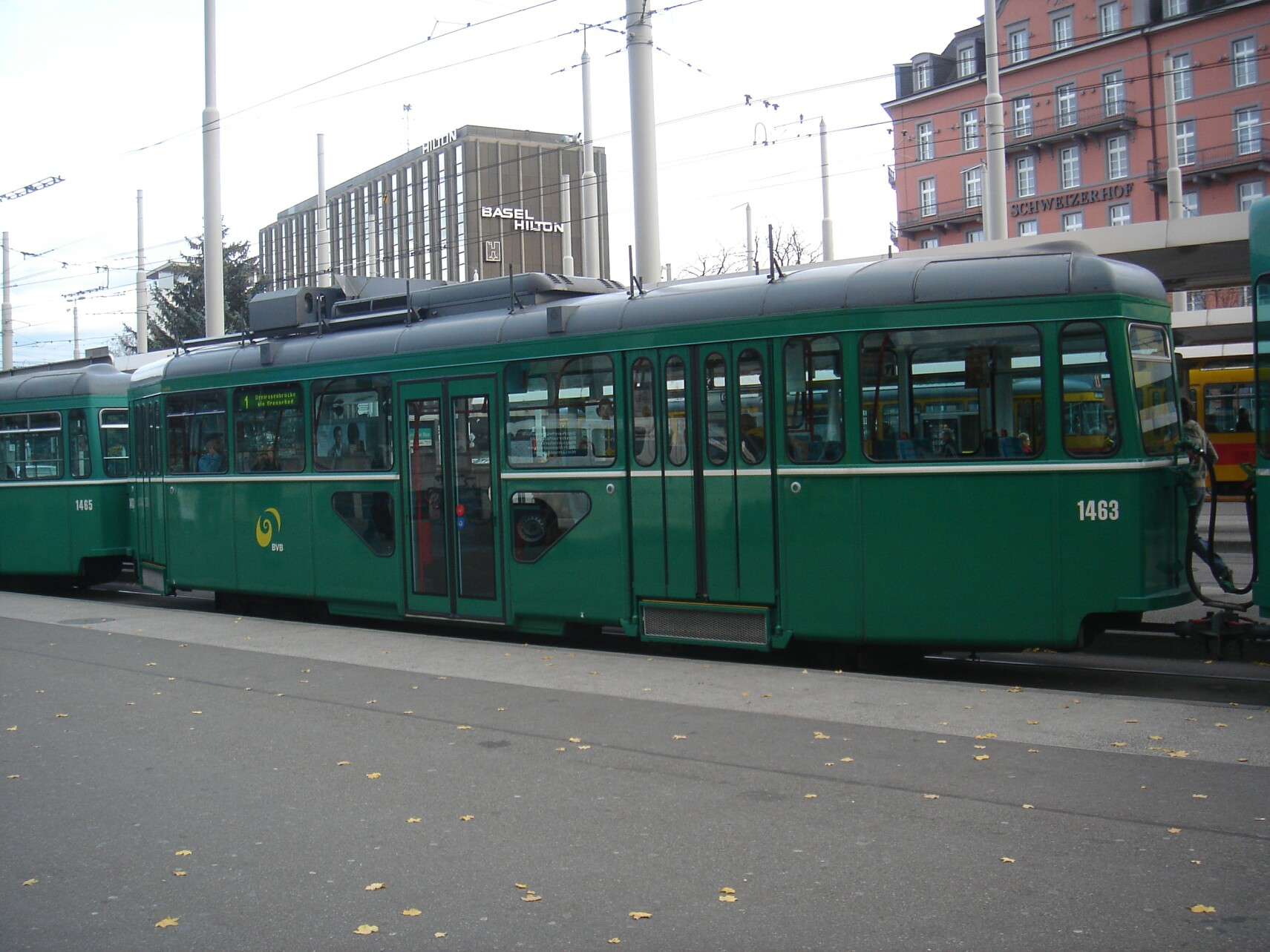 BVB Niederflurwagen B 1463 beim Bahnhof Basel SBB